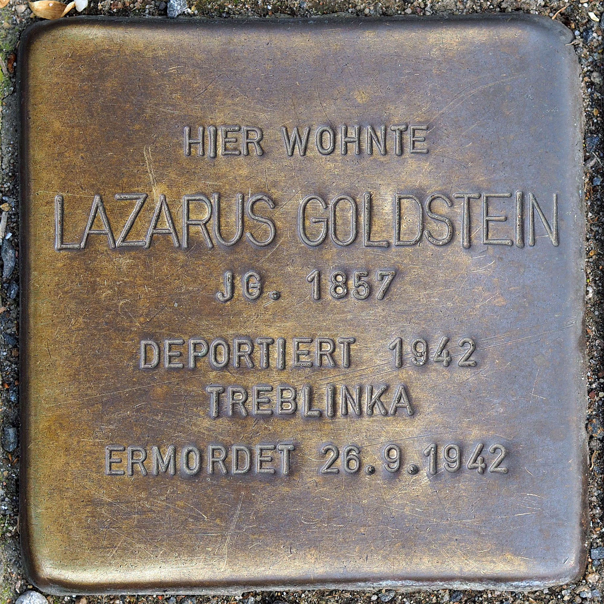 Stolpersteine GV: Goldstein, Lazarus